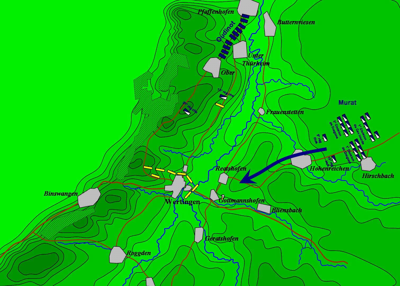 Positions initiales Wertingen